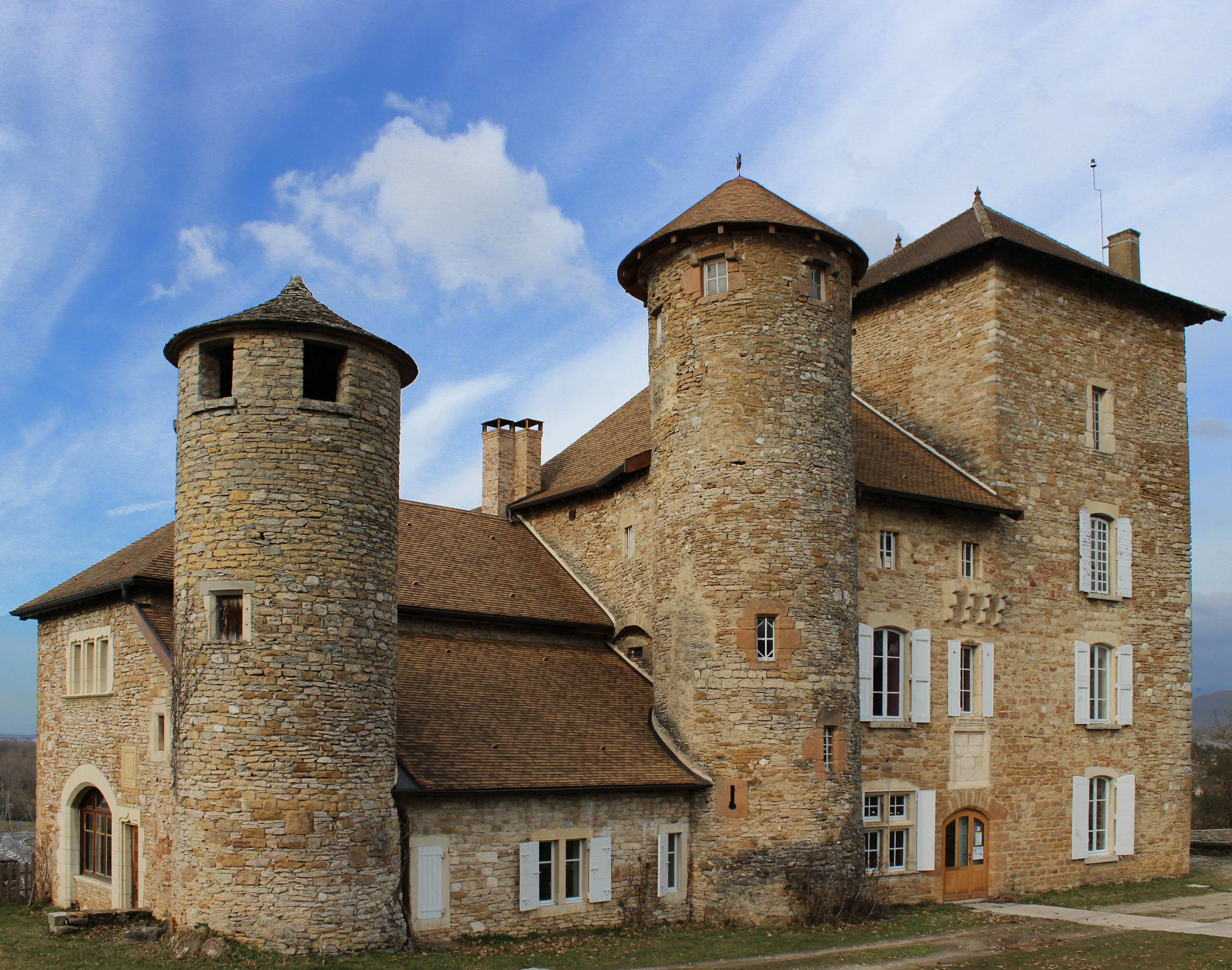 La commanderie de Montiracle à Villemoirieu.